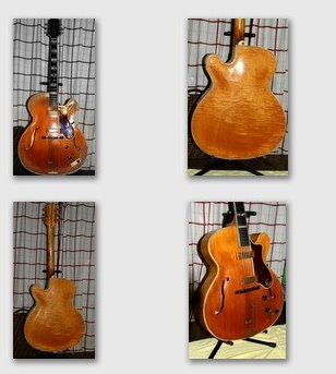 Archtop guitars